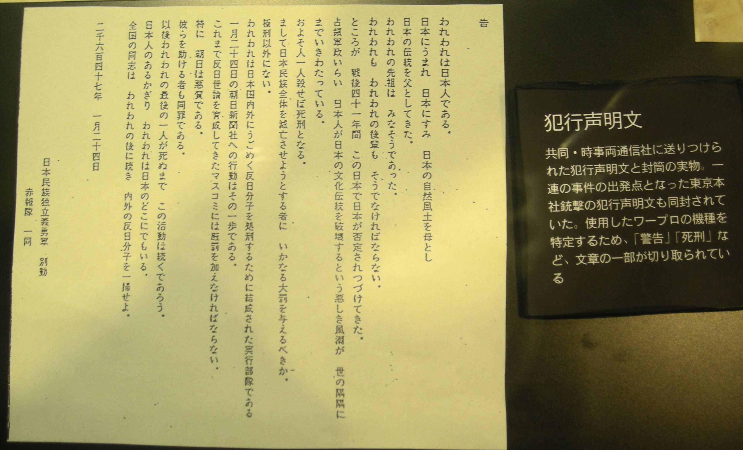 朝日新聞襲撃事件資料室